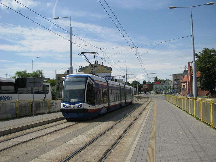 Linia 3 #365